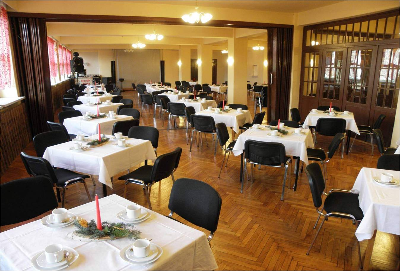 Kulturhaus Plessa (culture house Plessa, small hall after renovation with volunteers, 2009)